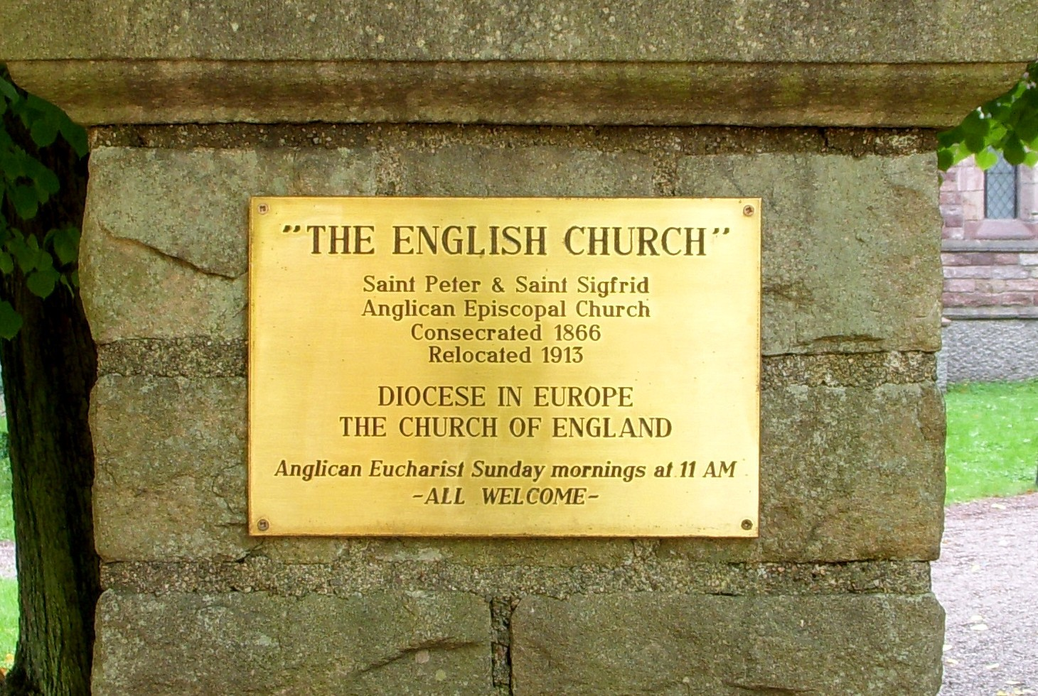 Engelska kyrkan, Stockholm, entréskylt